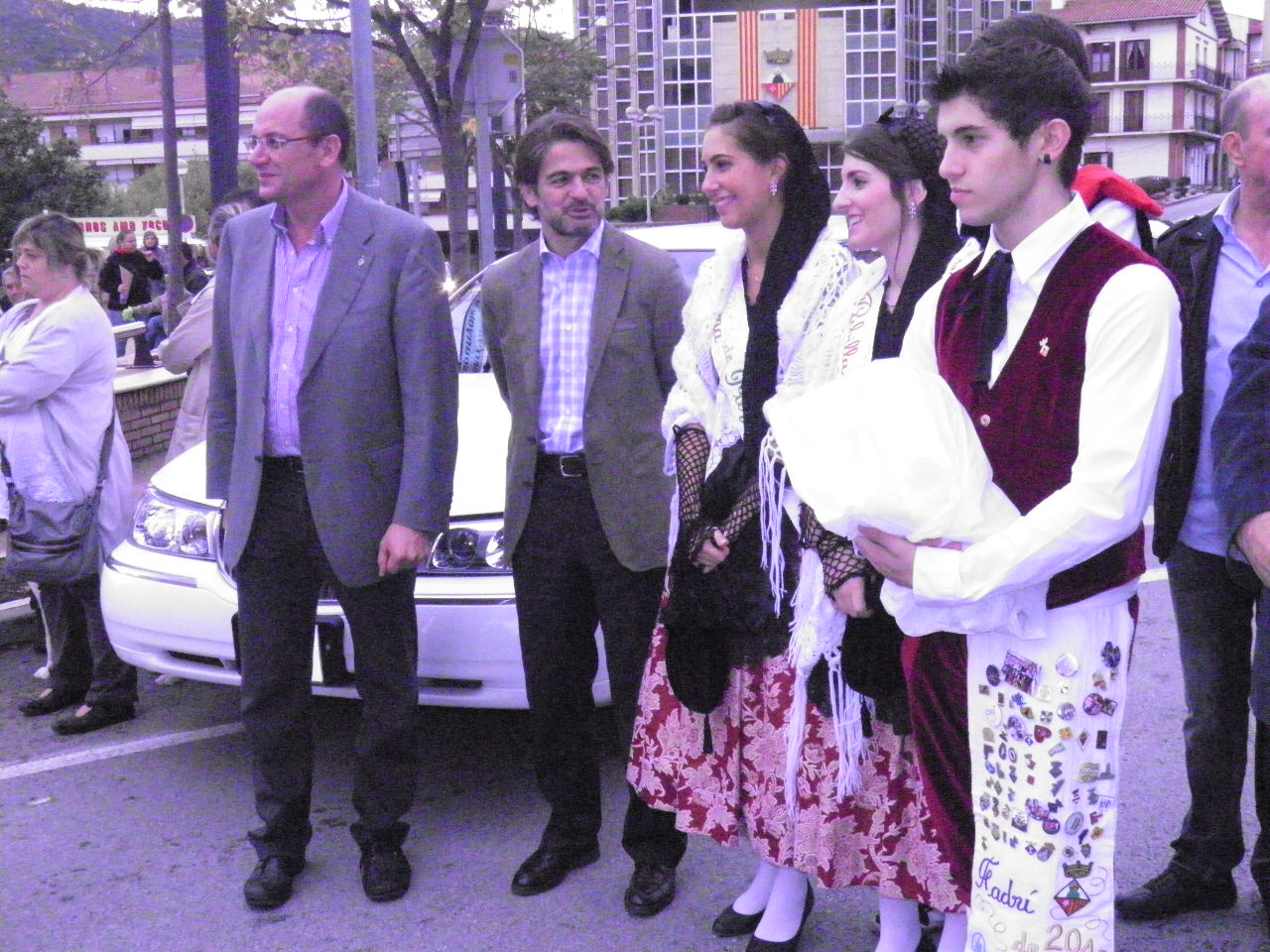 Generals 2011. O. Pujol pubilles i hereu de Puig-reig.